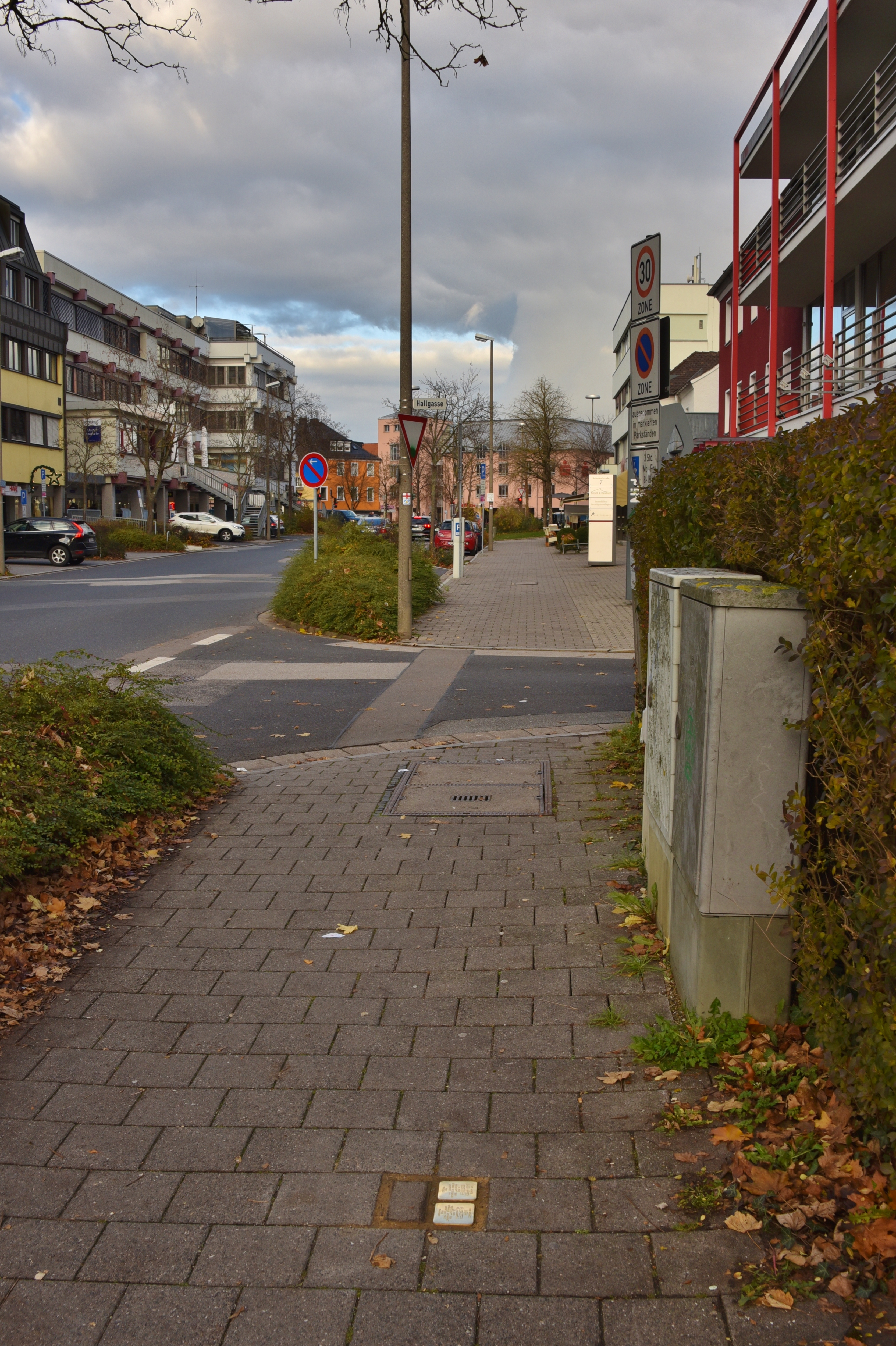 Stolpersteine in Neumarkt in der Oberpfalz mit Platzhalter